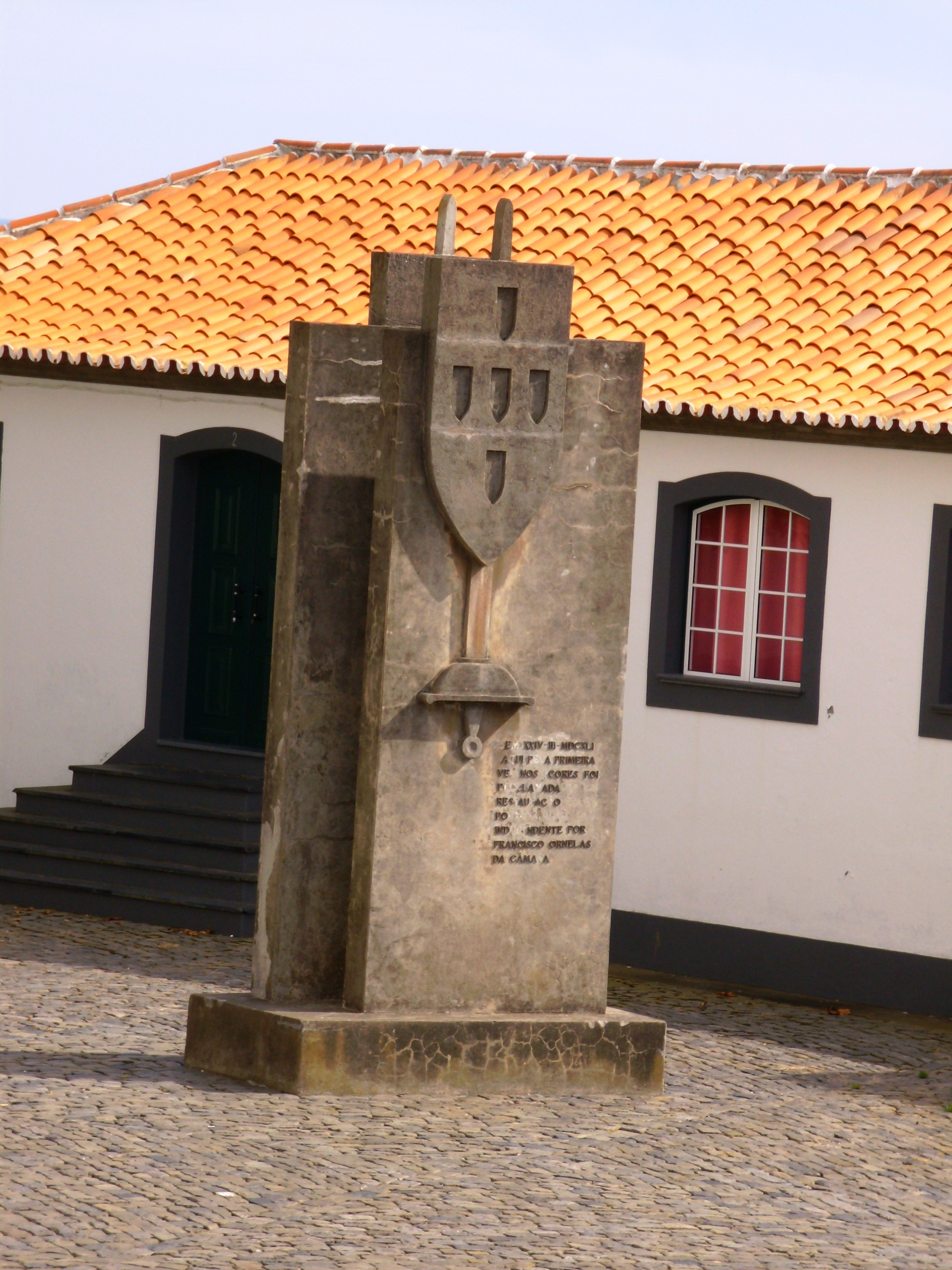 Monumento evocativo da Restauração erguido pelo Estado Novo Português, adro da Igreja Matriz de Santa Cruz, Praia da Vitória, Ilha Terceira, Açores.